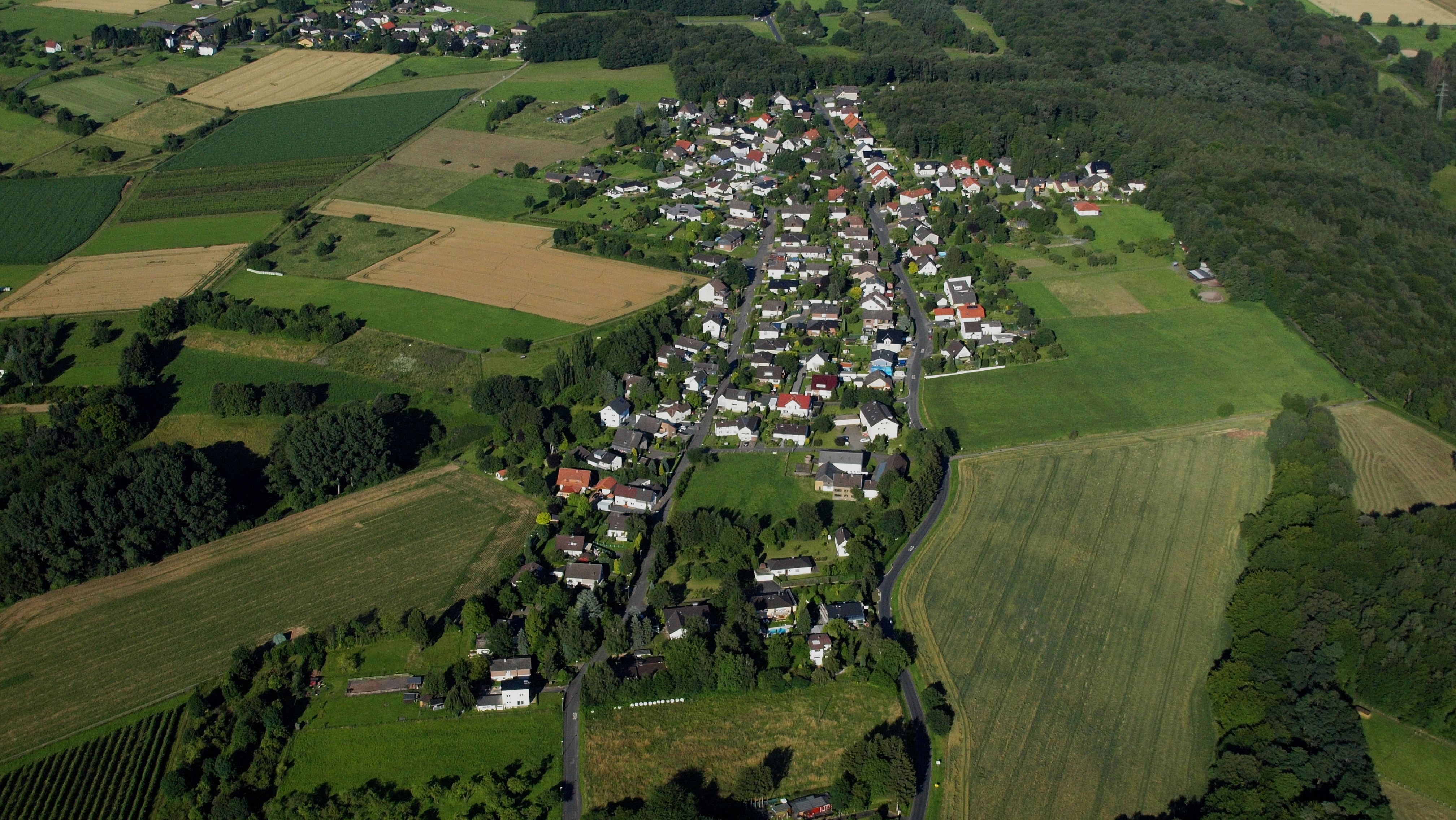 Frohnhardt, Königswinter